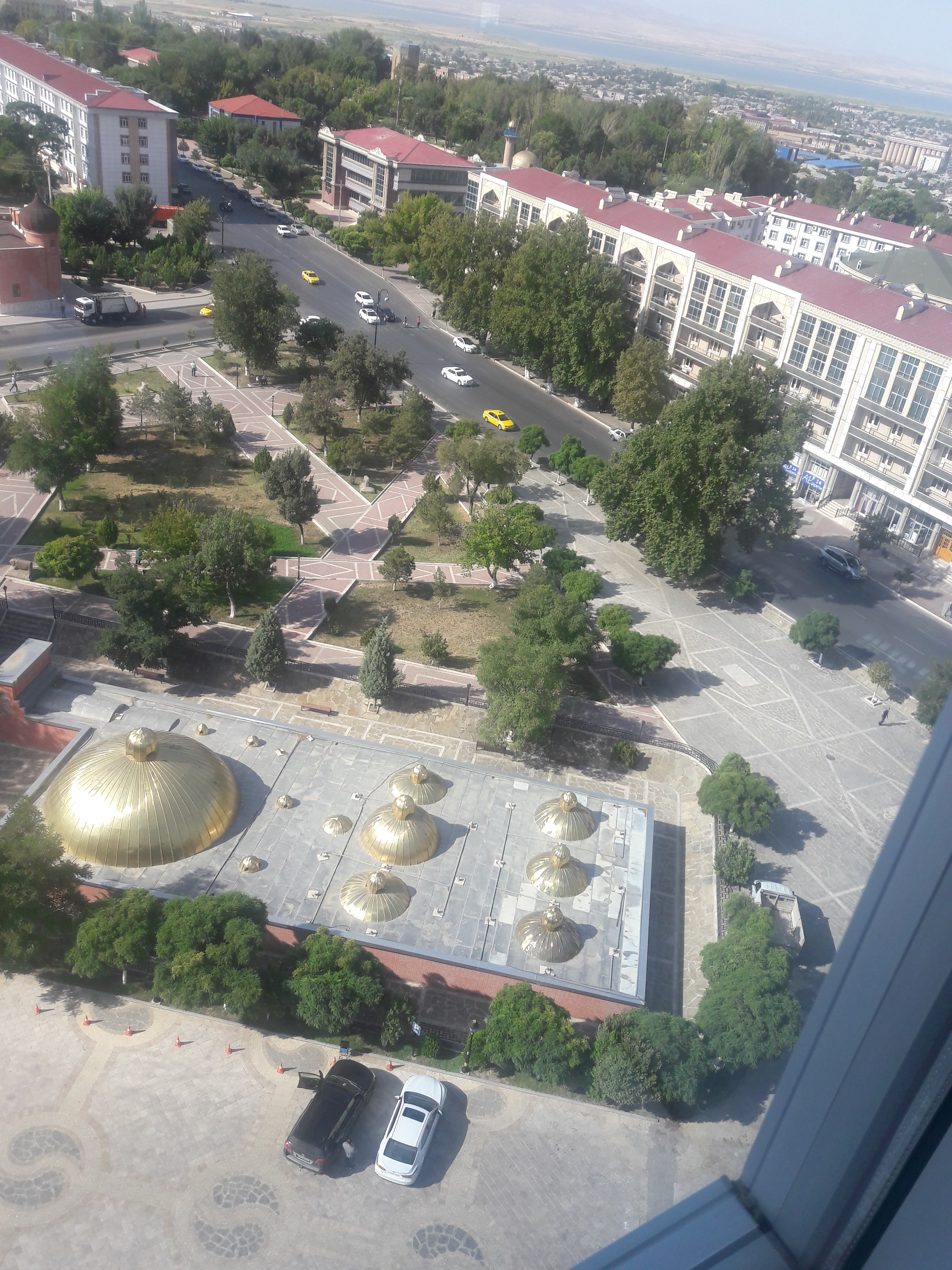 Təbriz mehmanxanasından görünüş